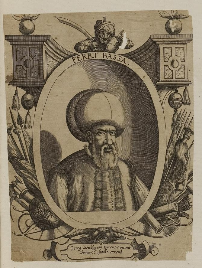 Grafik aus dem Klebeband Nr. 1 der Fürstlich Waldeckschen Hofbibliothek Arolsen Motiv: "Ferat Bassa" (= Ferhad Pasha Sokolović)